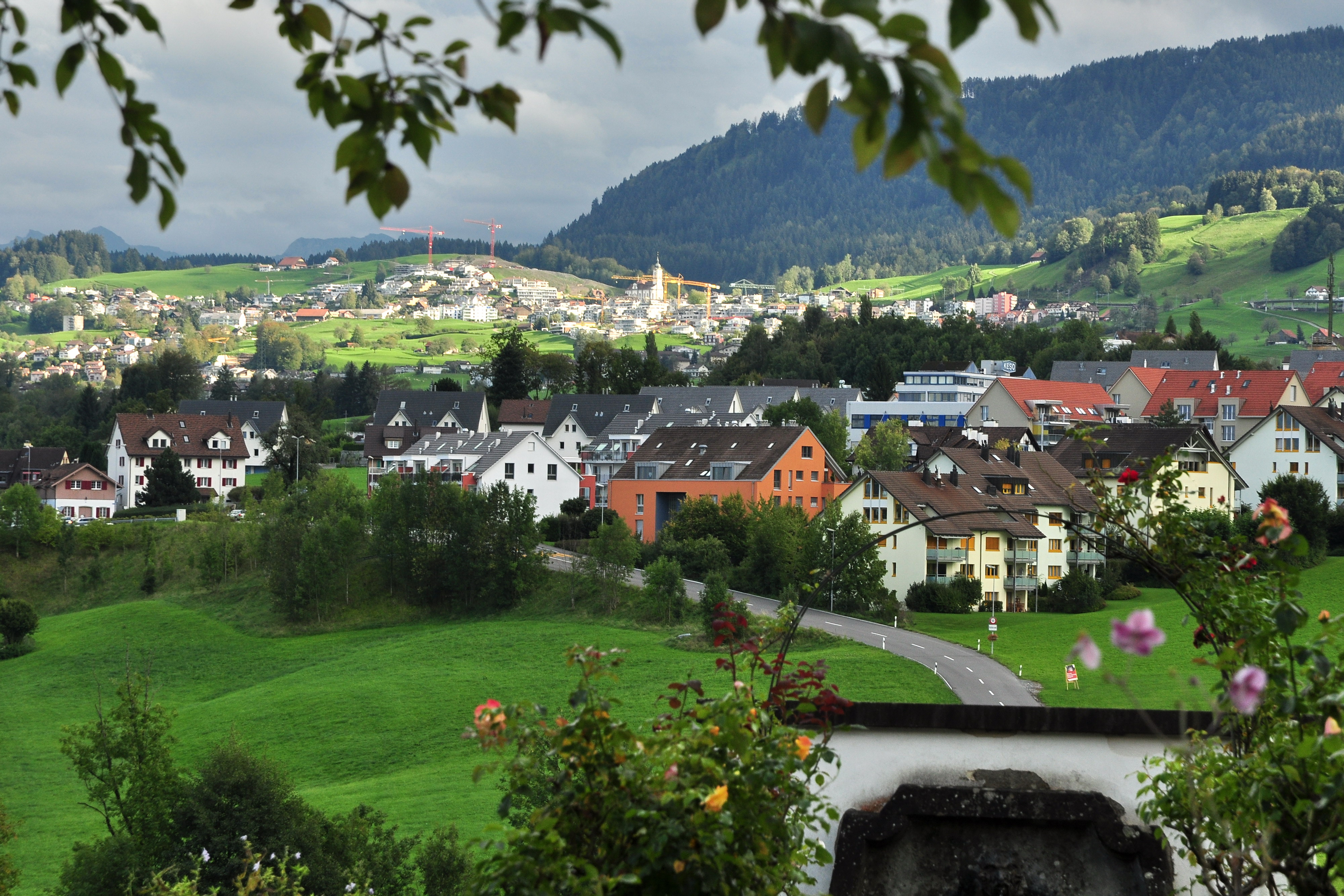 Richterswil-Samstagern as seen from Neuguet in Wädenswil (Switzerland), Schindellegi and Höhronen in the background.